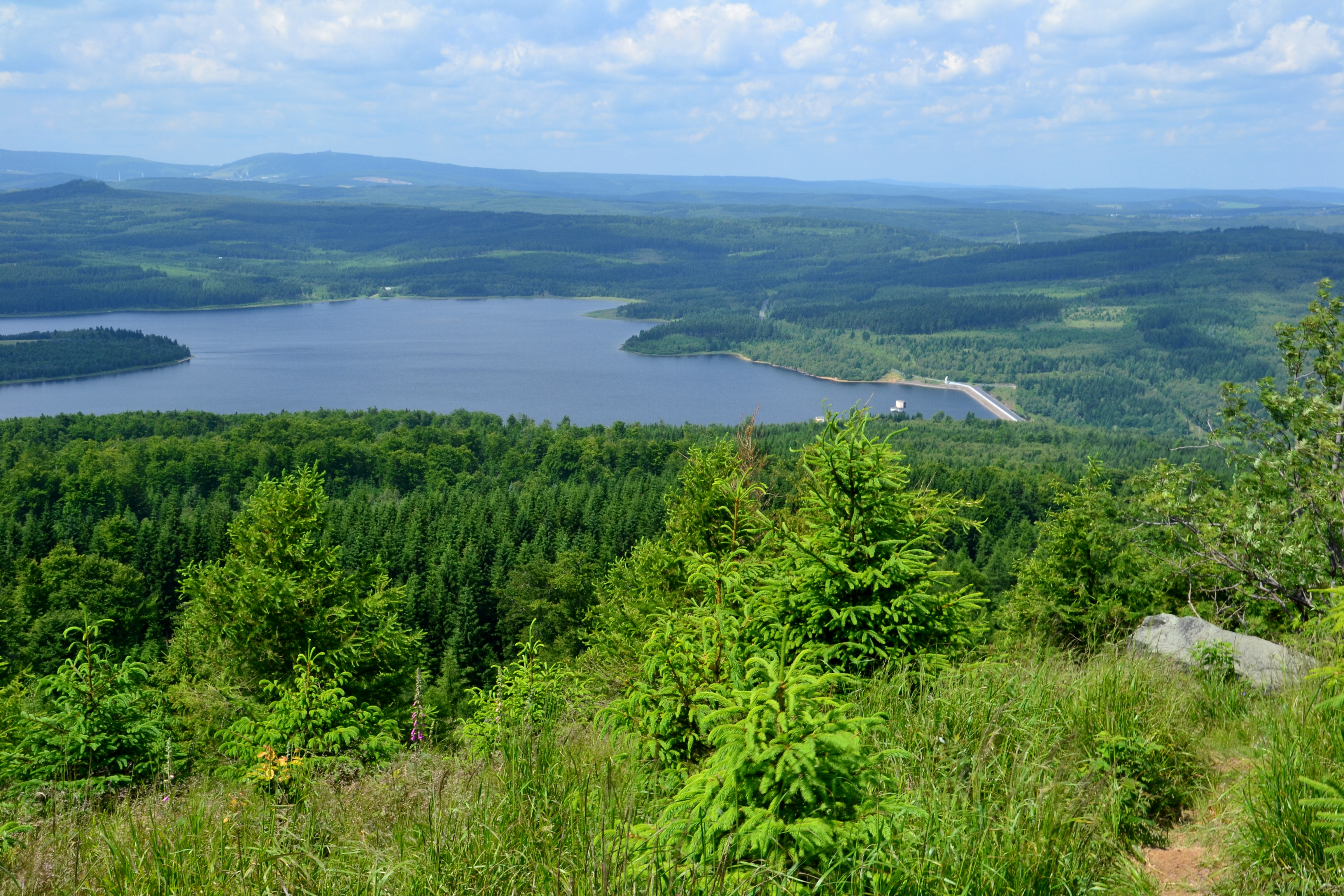 Pohled z Jelení hory na vodní nádrž Přísečnici